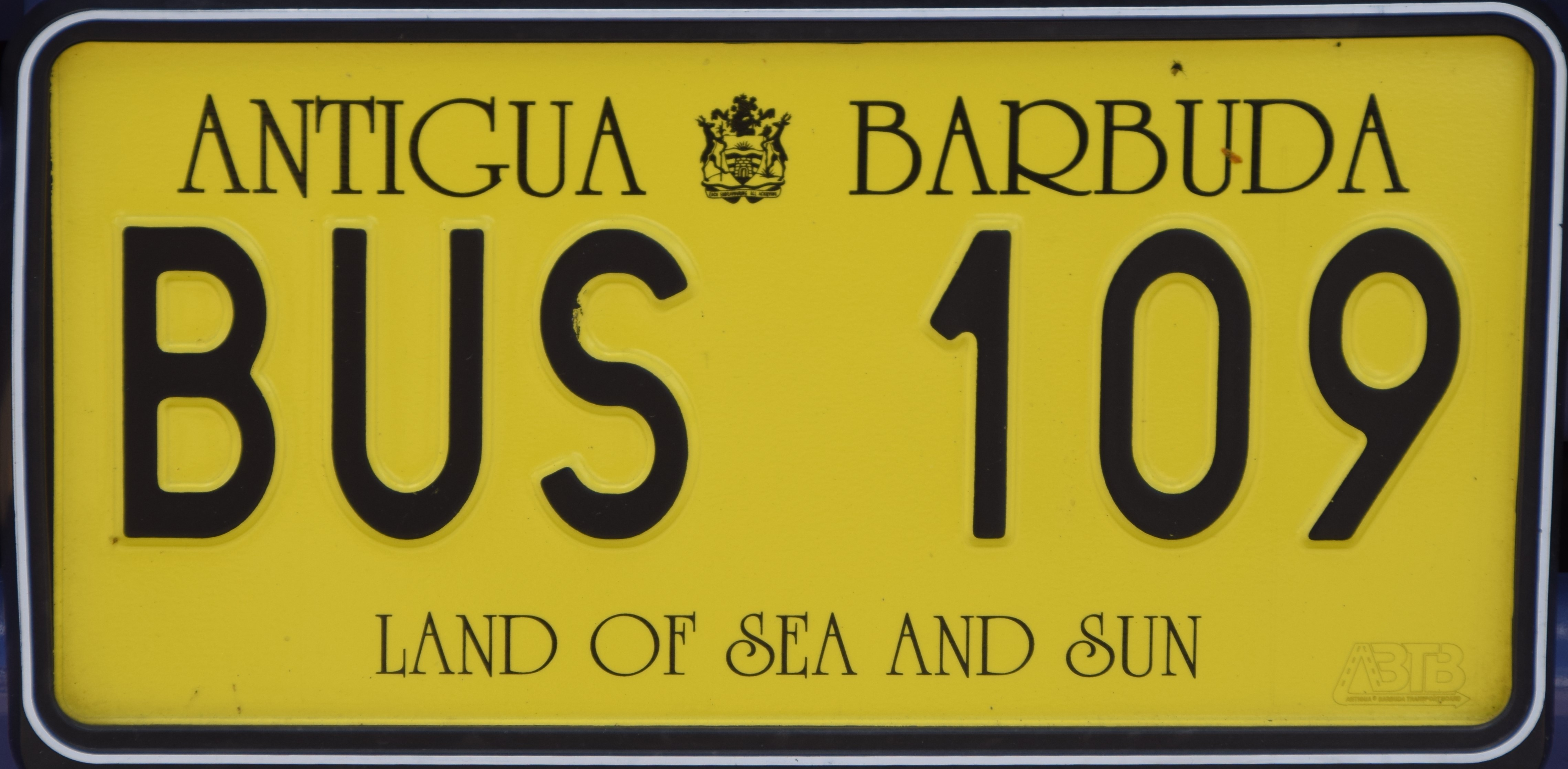 Bus kenteken Antigua and Barbuda